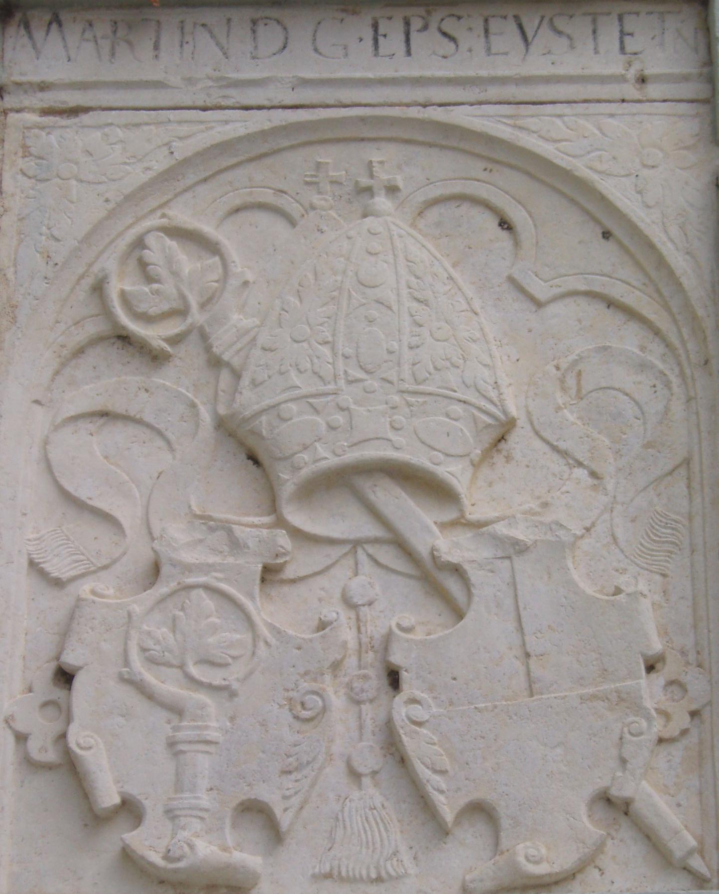 Wappenstein des Eichstätter Fürstbischofs Martin von Schaumberg in Schloss Hirschberg